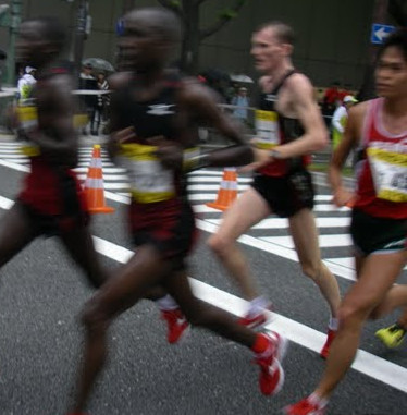 Yuki Kawauchi: Japanese marathon runner -- the right end of this photo -- Osaka Marathon 2011